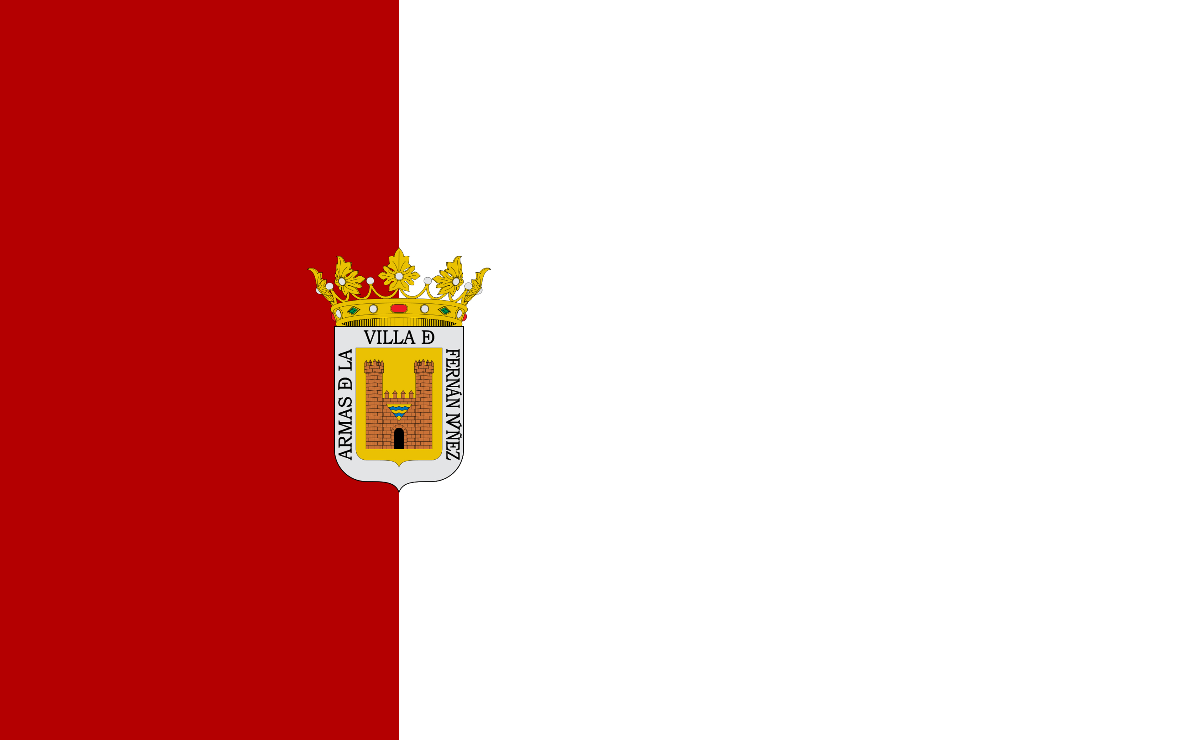 Bandera de Fernán Núñez. Dimensiones 1 x 1,618. Dividida en tres franjas verticales, de izquierda a derecha: la primera franja, de gules, siendo la segunda y la tercera de color blanca. La primera representa en color rojo bermellón ("Rojo Fernán Núñez") el pasado ilustre de la villa, el color del edificio más emblemático de la localidad: el Palacio Ducal. La segunda y la tercera franja, en blanco puro, representa el presente y el futuro del municipio: la villa. El escudo de armas local une ambas franjas: pasado y futuro, aristocracia y pueblo.